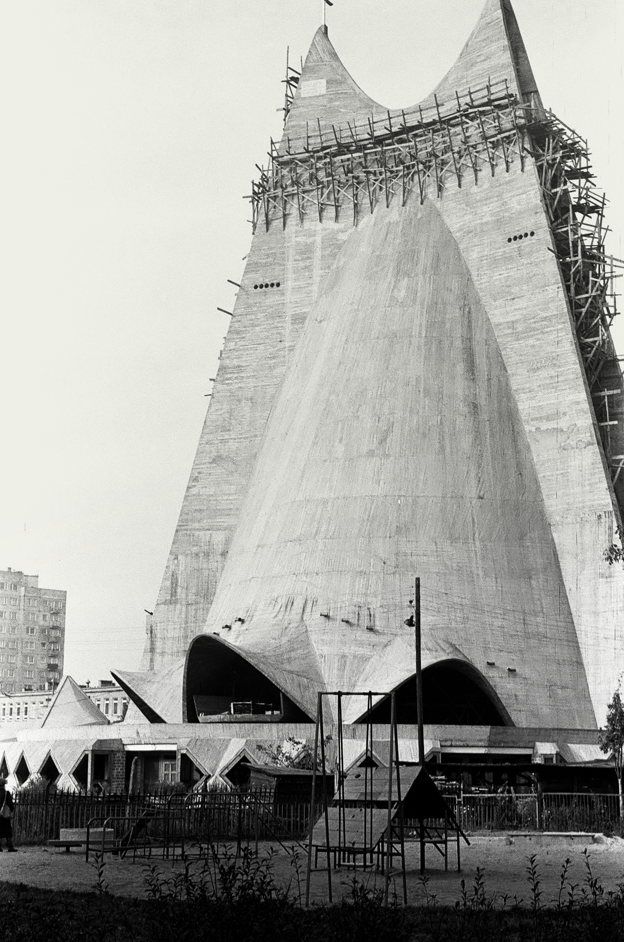 Kalisz - 1984 r. Budowa kościoła pw. Miłosierdzia Bożego przy ul. Asnyka. Wizjonerski projekt architektów Jerzego Kuźmienki (27 lat) i Andrzeja Fajansa (23 lata) wygrał konkurs na projekt kościoła w 1957 r. Realizacja nastąpiła w l. 1977 - 1993 (użytkowany w części od 1983 r.). Budynek to gigantyczna łupina jednopowłokowa, sprawiająca wrażenie unoszonej białej chusty (całunu ?).